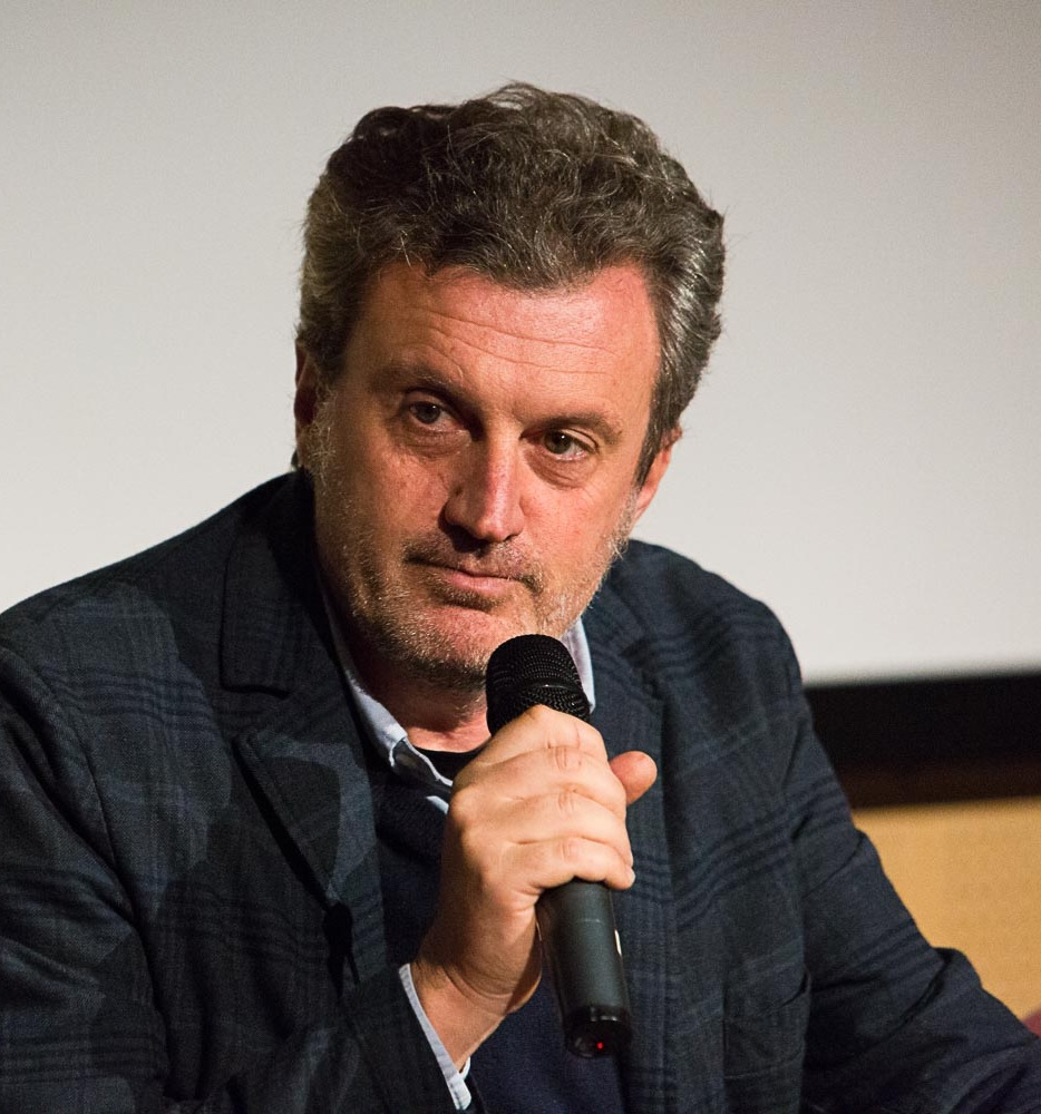 Antonio Manzini, scrittore italiano